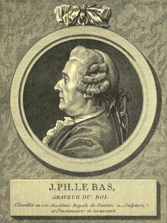 Portrait of Jacques-Philippe Le Bas (1707-1783), French engraver